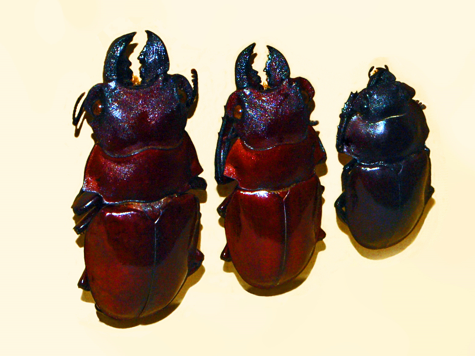 Odontolabis gazella inaequalis from Nias Island